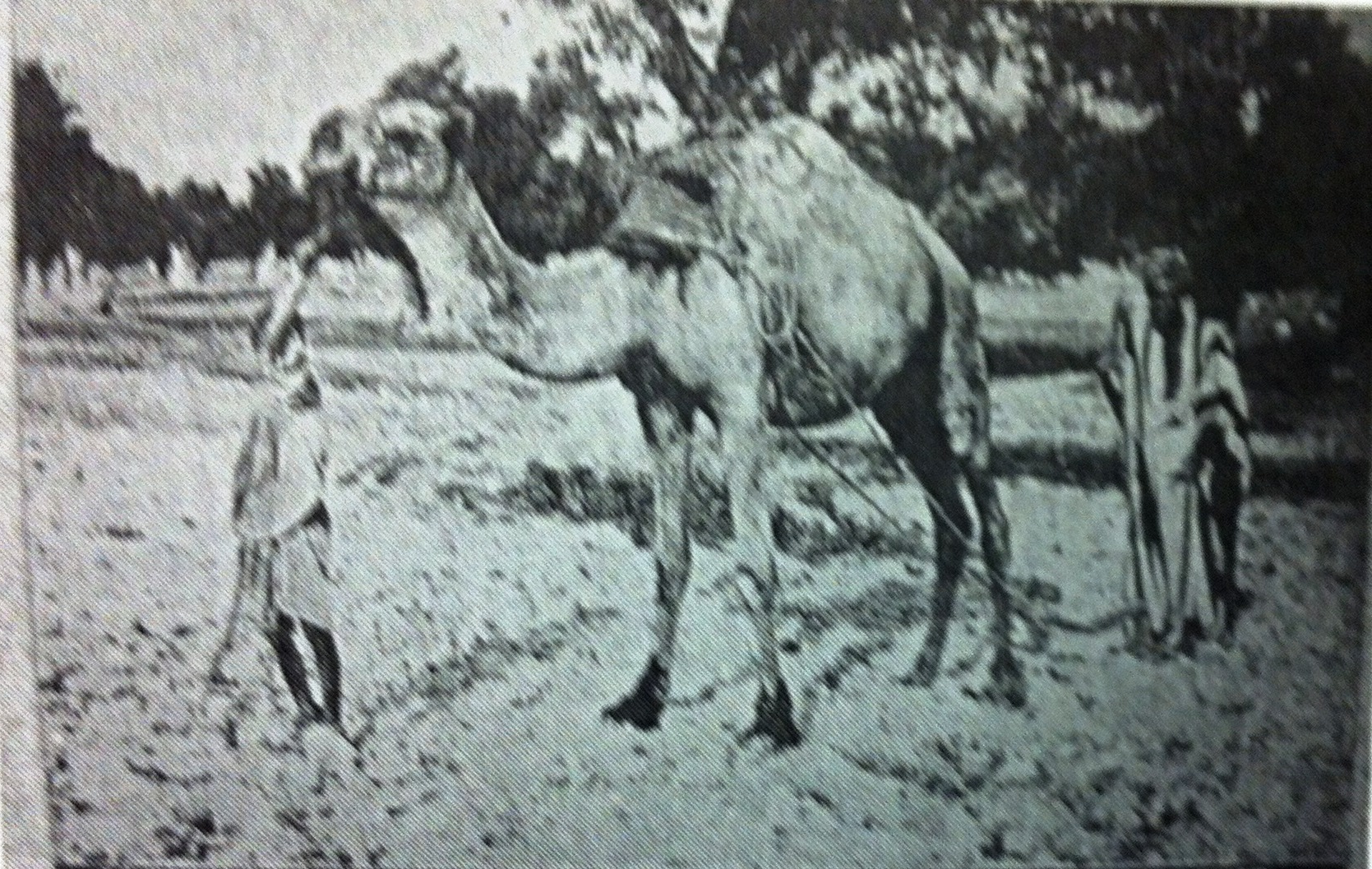 טורקמני חורש במחרשת עץ בשנת 1905